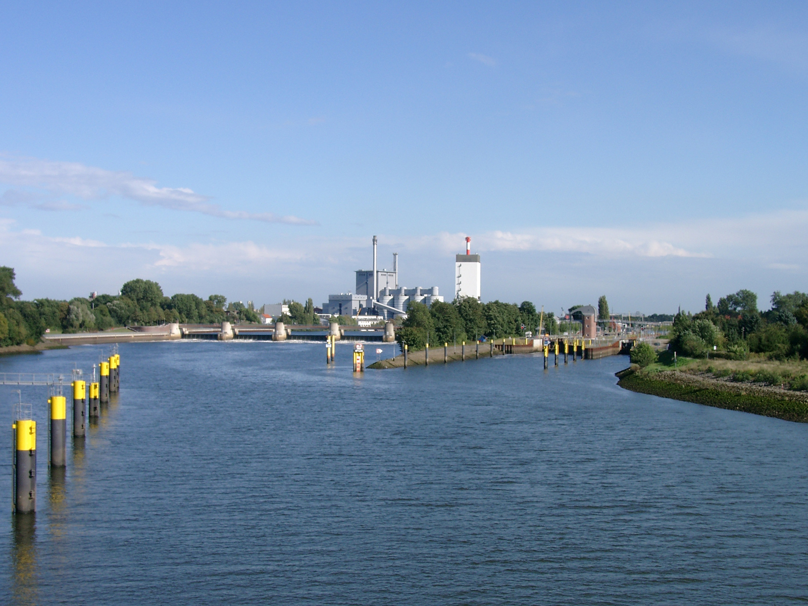 Die Weser stromaufwärts von der Erdbeerbrücke in Bremen fotografiert. Zu sehen sind im Vordergrund das Weserwehr und die Hemelinger Schleuse, im Hintergrund das Kraftwerk Bremen-Hastedt.